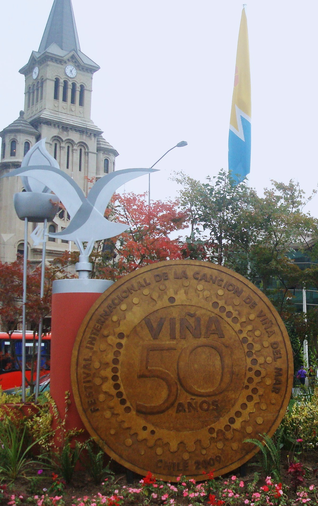 50 años Festival de Viña del Mar, Chile